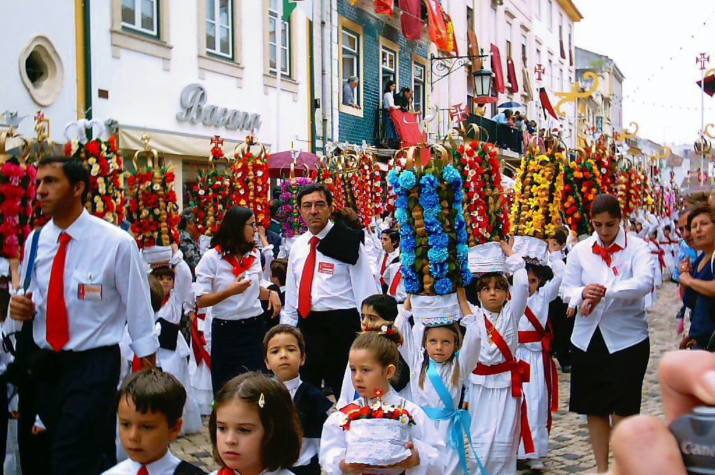 Festa dos Tabuleiros 2003, Cortejo dos Rapazes, Rua Serpa Pinto, Tomar